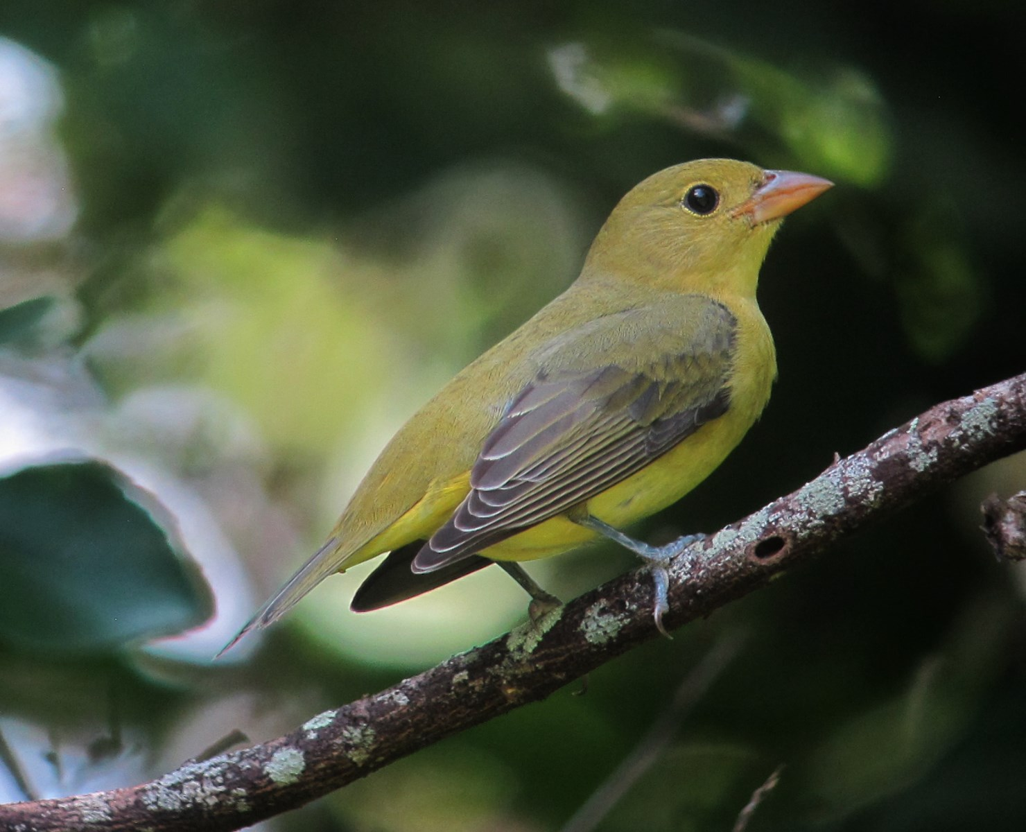 San Andrés Islas, Colombia